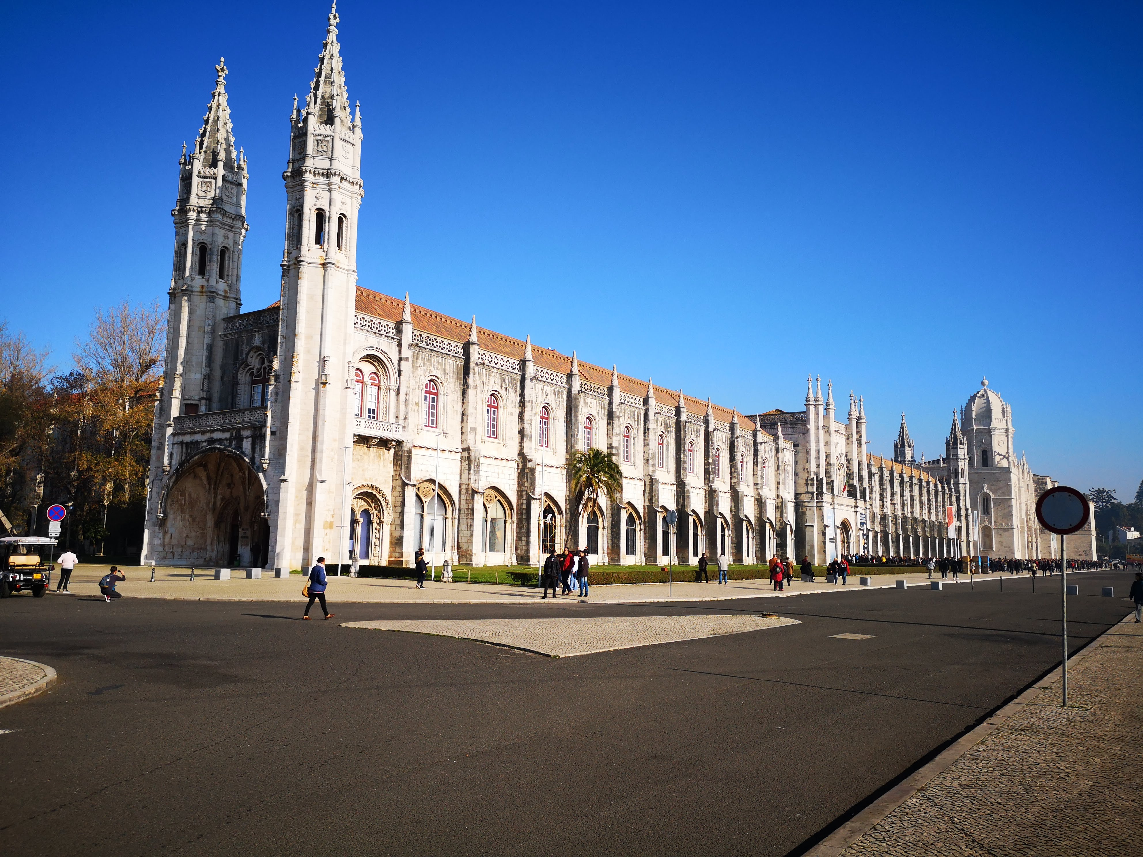 Belem (PT). Monastero dos Jerónimos - Vista Ovest